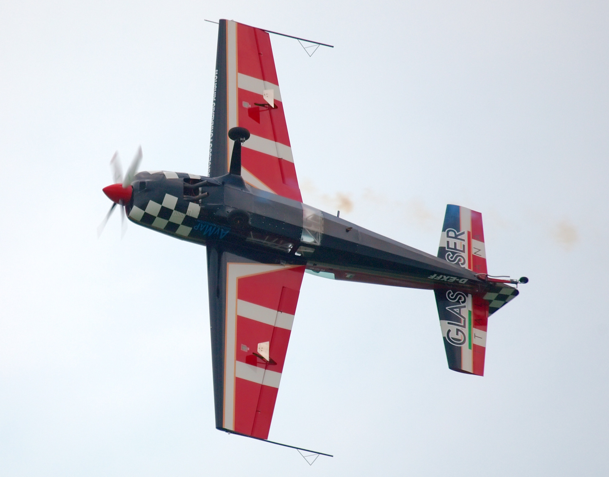 Extra 300L during "Air Extreme" 29.08.2009 in Jesolo